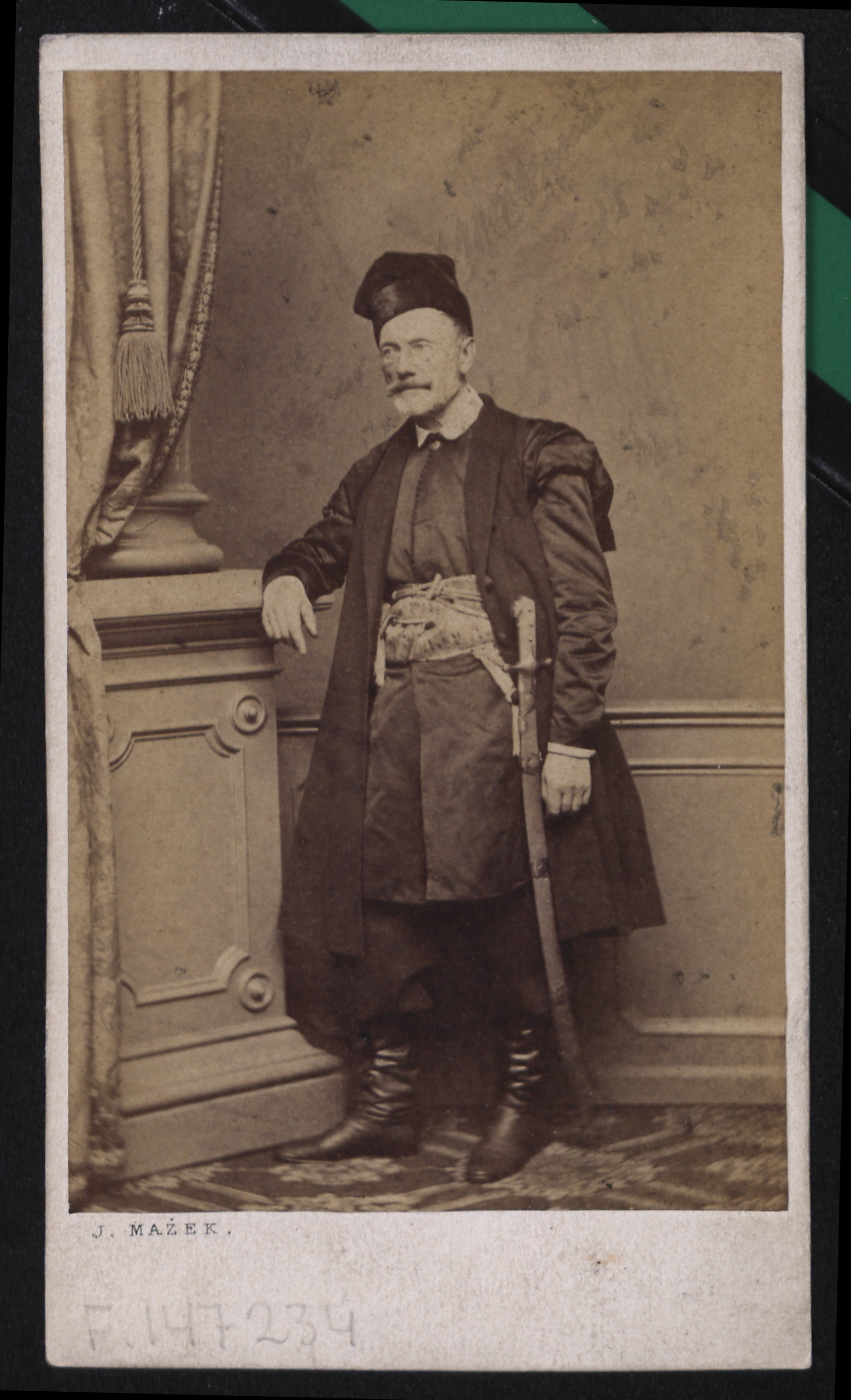 Piotr Moszyński, [1860-1870